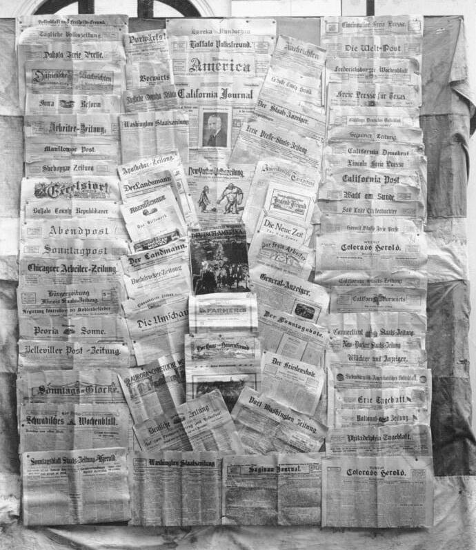 Deutsche Zeitungen in Nordamerika Deutsche Zeitungen in Nordamerika [Stellwand mit deutschen Zeitungen in Nordamerika, März - September 1922]